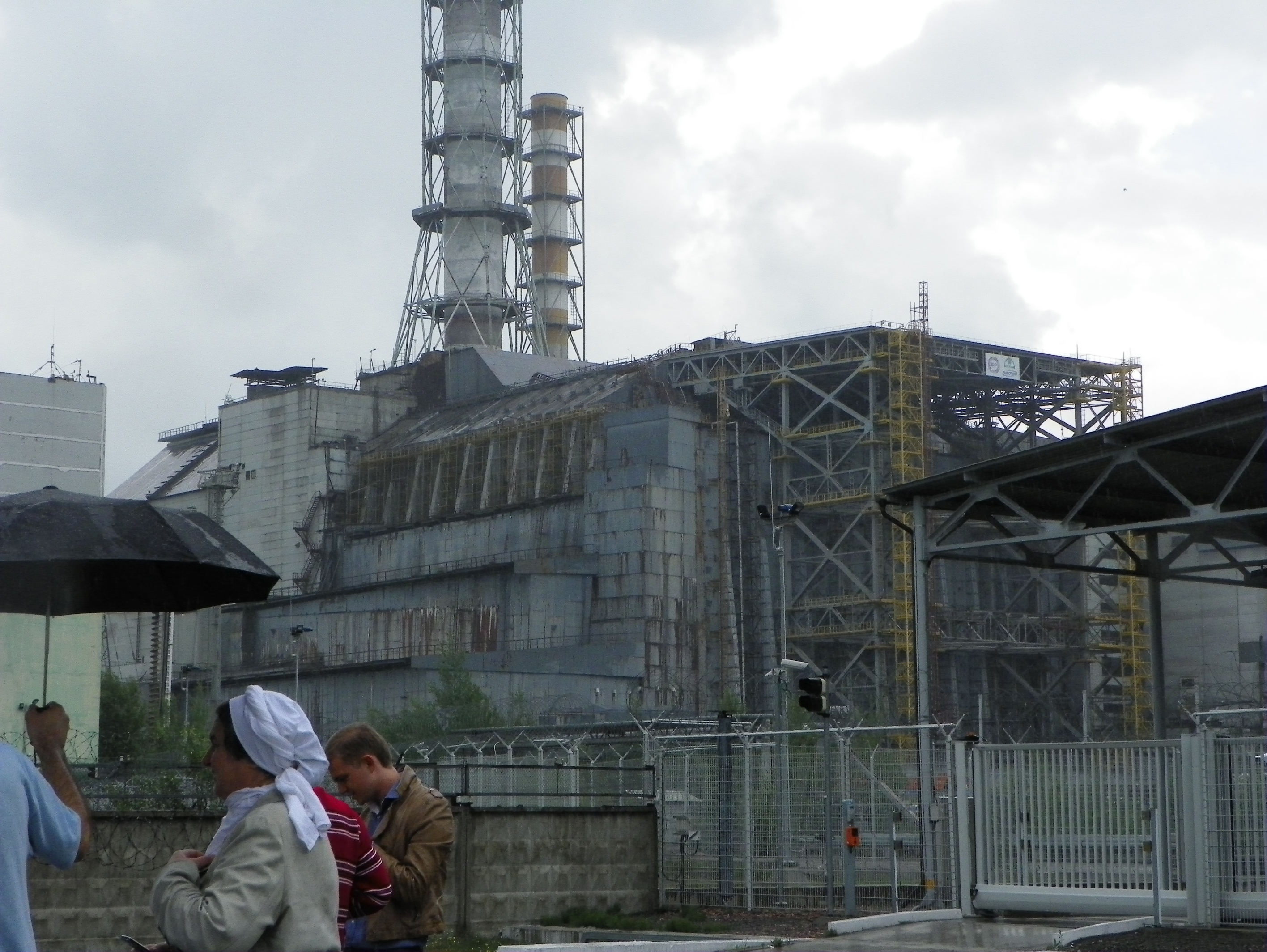 Чорнобильська АЕС